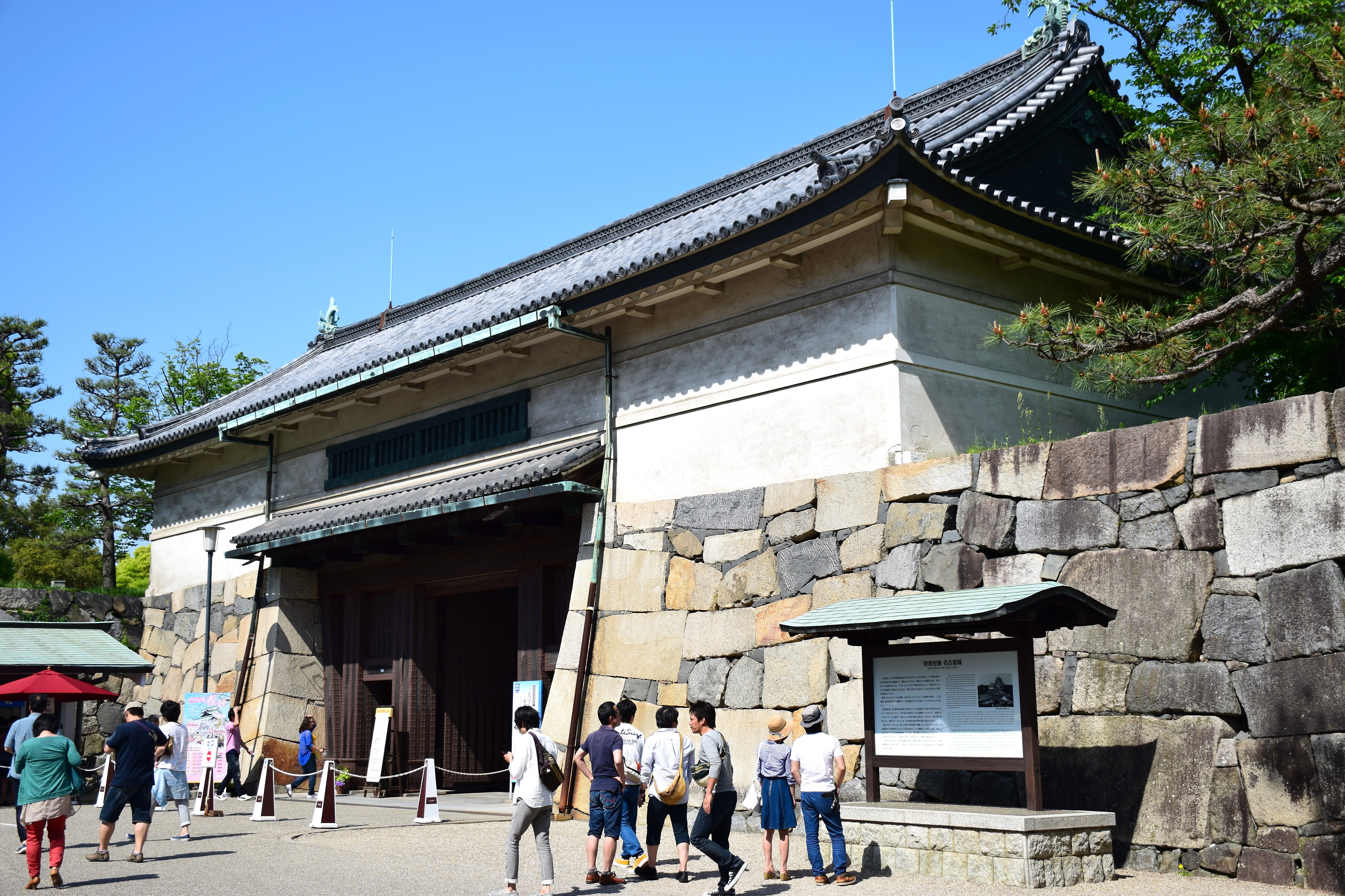 名古屋城正門